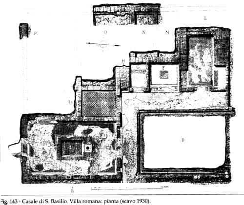 Il Casale di San Basilio: Sito archeologico Villa Romana (scavo 1930)